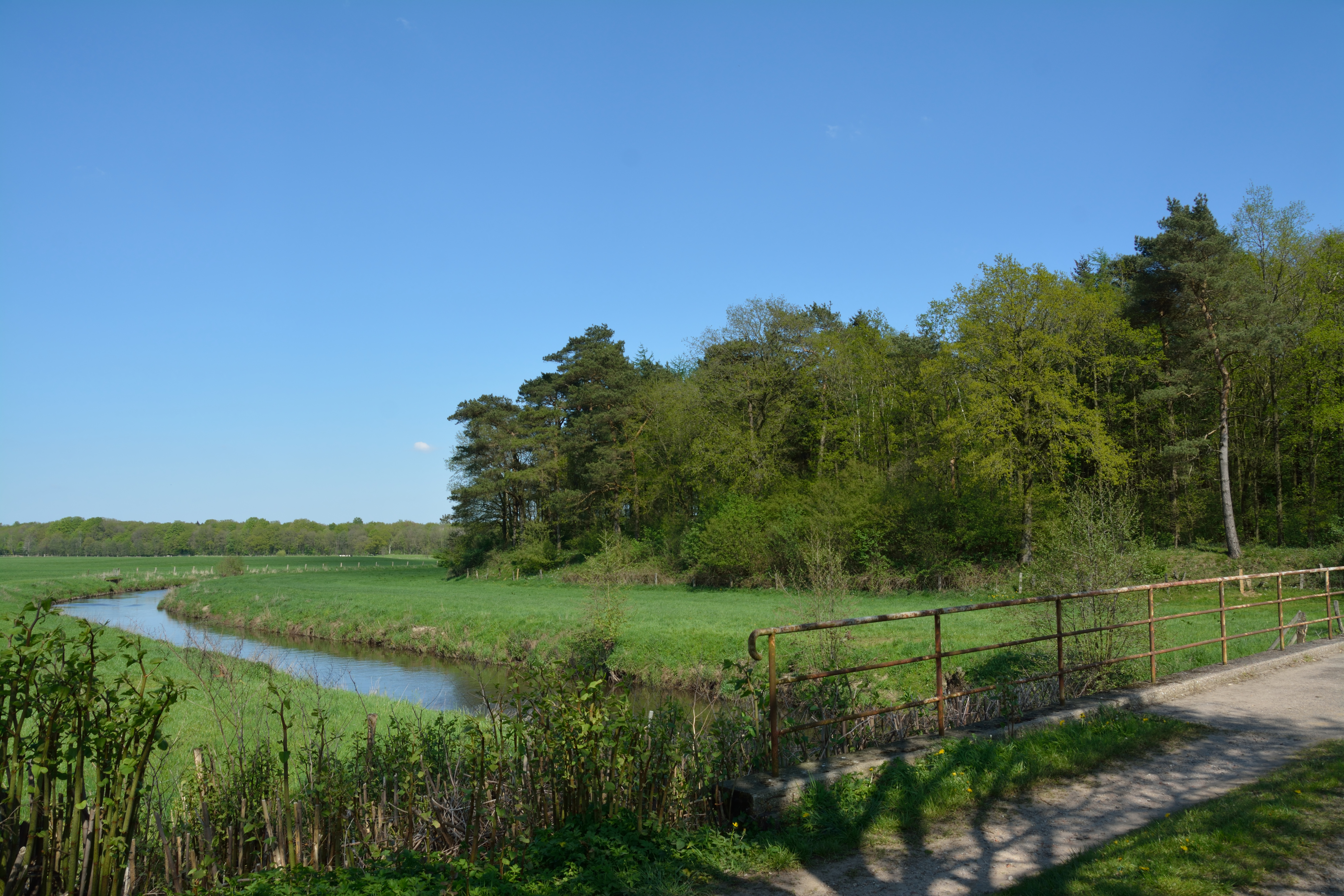 Impressionen aus Sarlhusen. Die Stör an der Störbrücke.